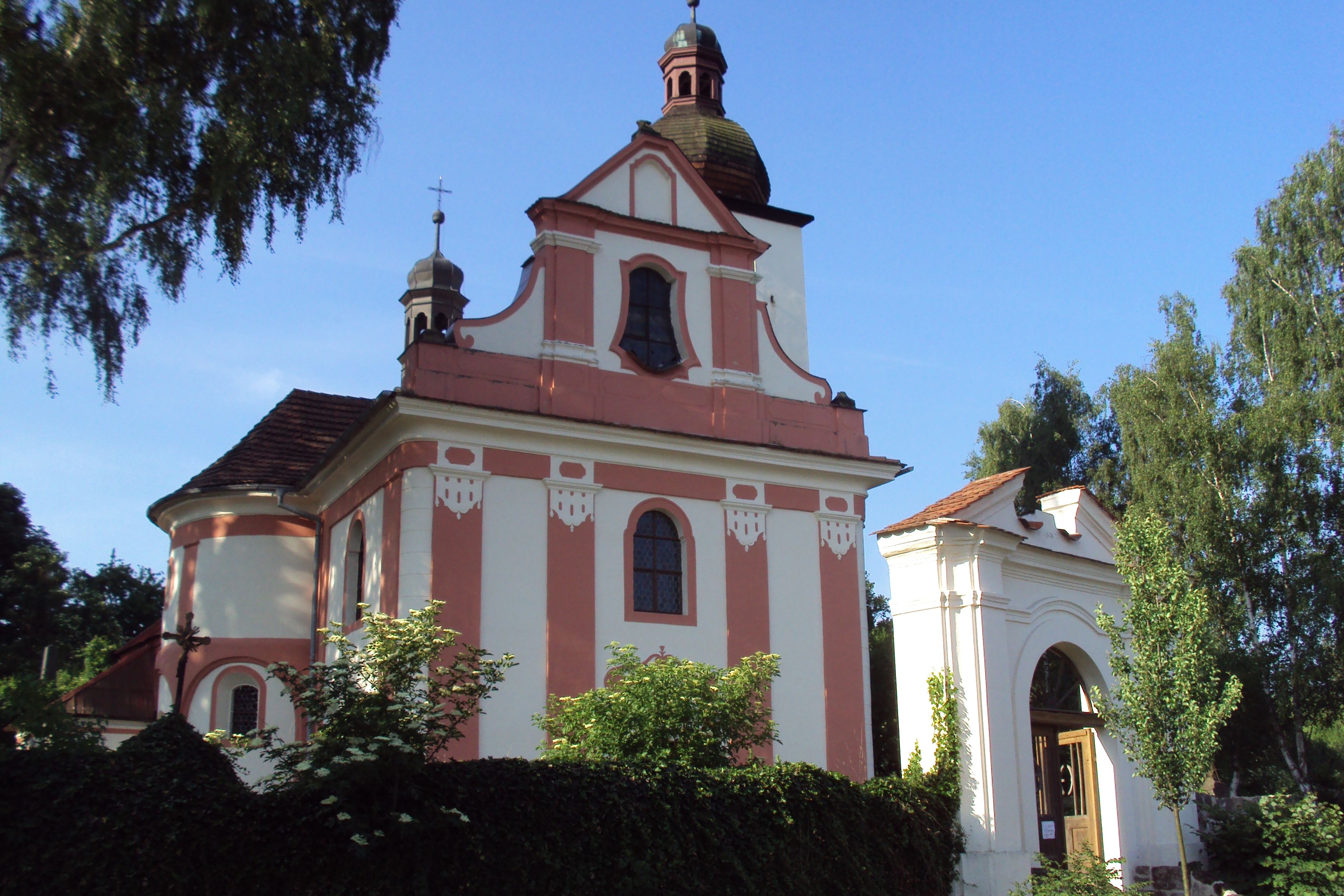 Kostel sv.Václava v Deštné